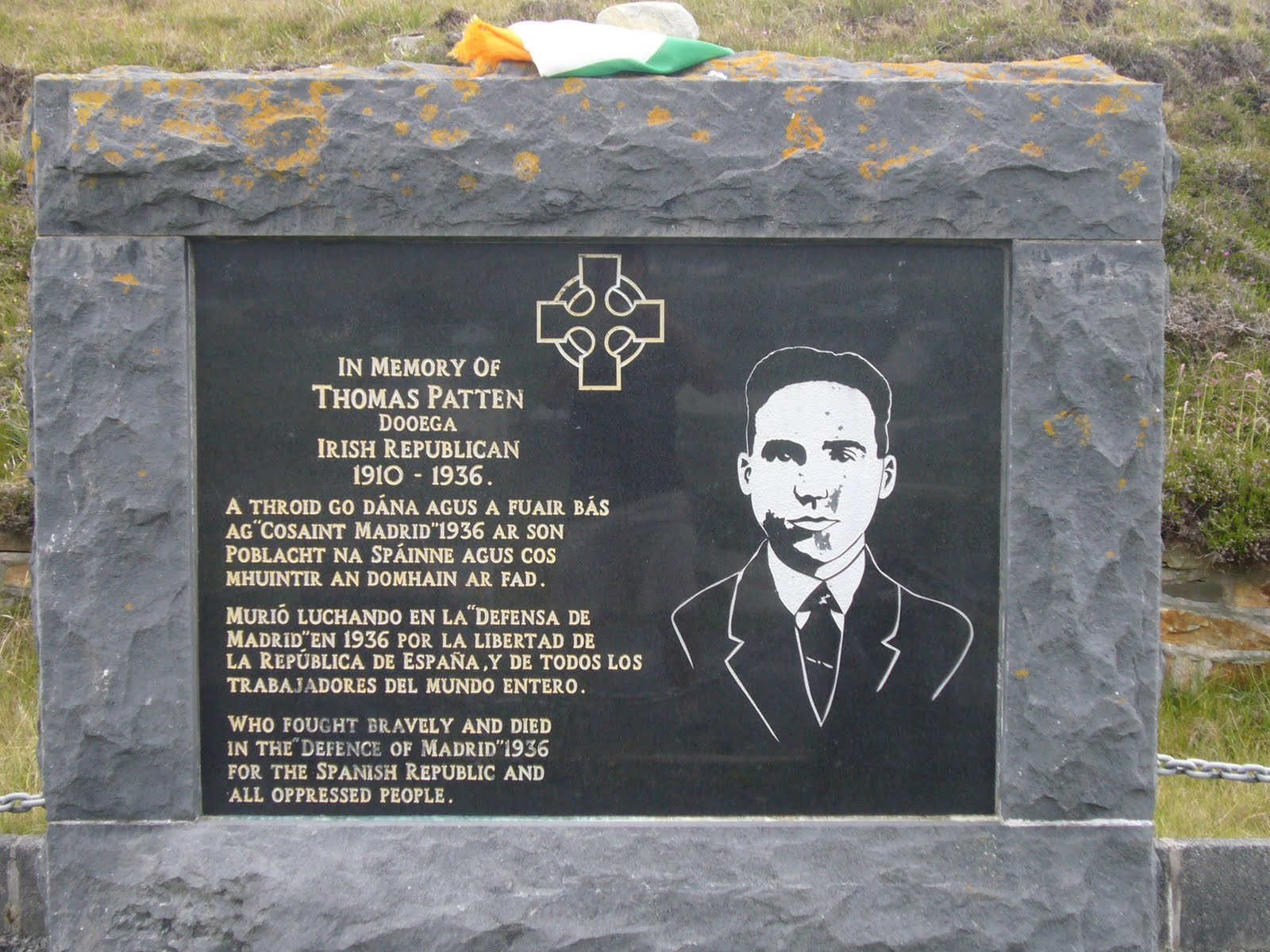 Le monument dédié à la mémoire de Thomas Patten près du village de Dooega, sur l'île d'Achill.